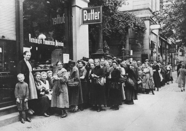 Berlin, Schlangestehen nach Lebensmittel ADN-ZB/Donath I. Weltkrieg 1914-18 Berlin: Schlange vor einem Lebensmittelgeschäft. Aufn.: 1917 [Berlin.- Schlange wartender Menschen (hauptsächlich Frauen) vor einem Lebensmittelgeschäft ("Vereinigte Pommersche Meiereien")]